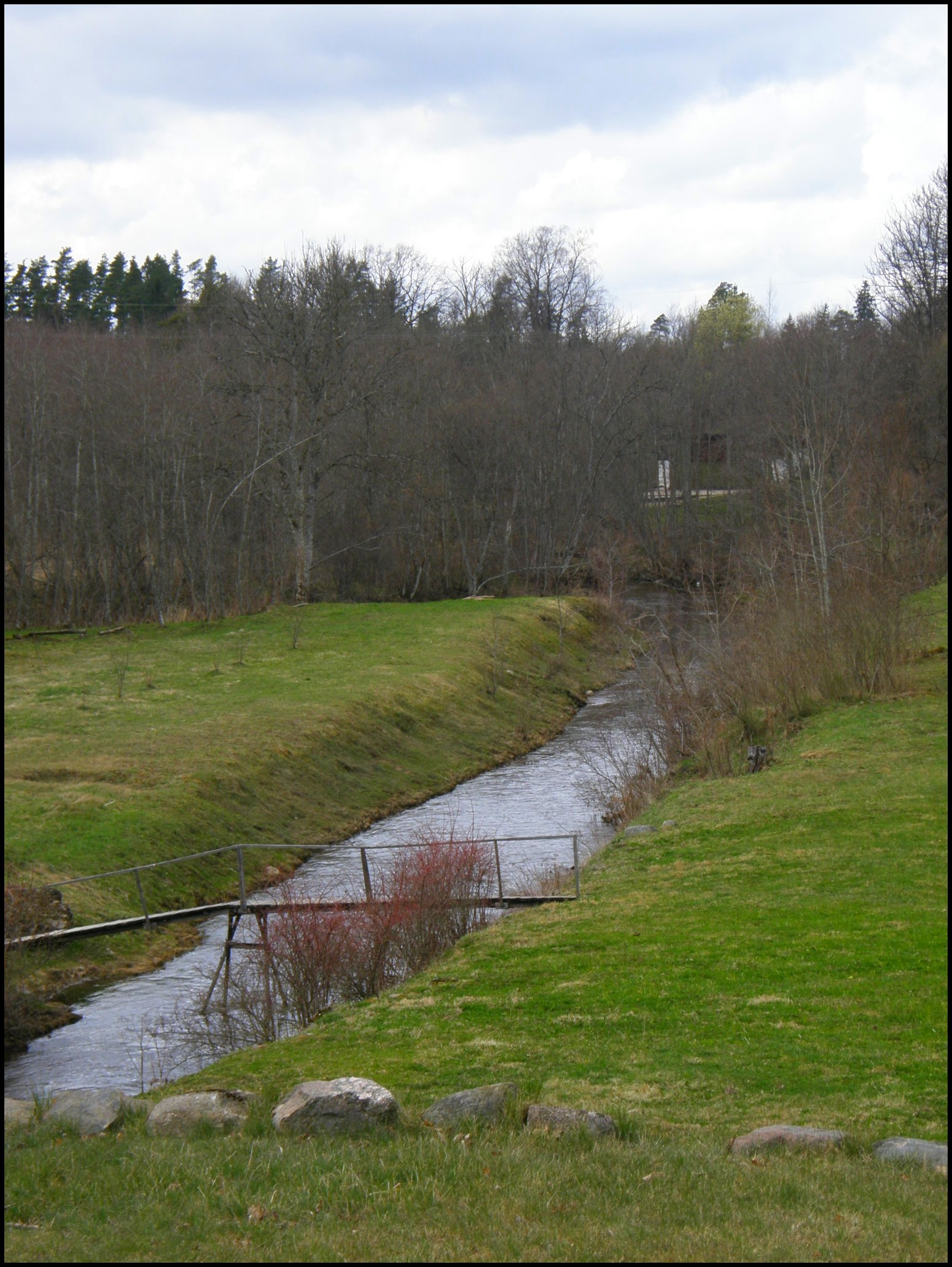 Zaņas upe,pie Dzirnavu ūdenskrātuves